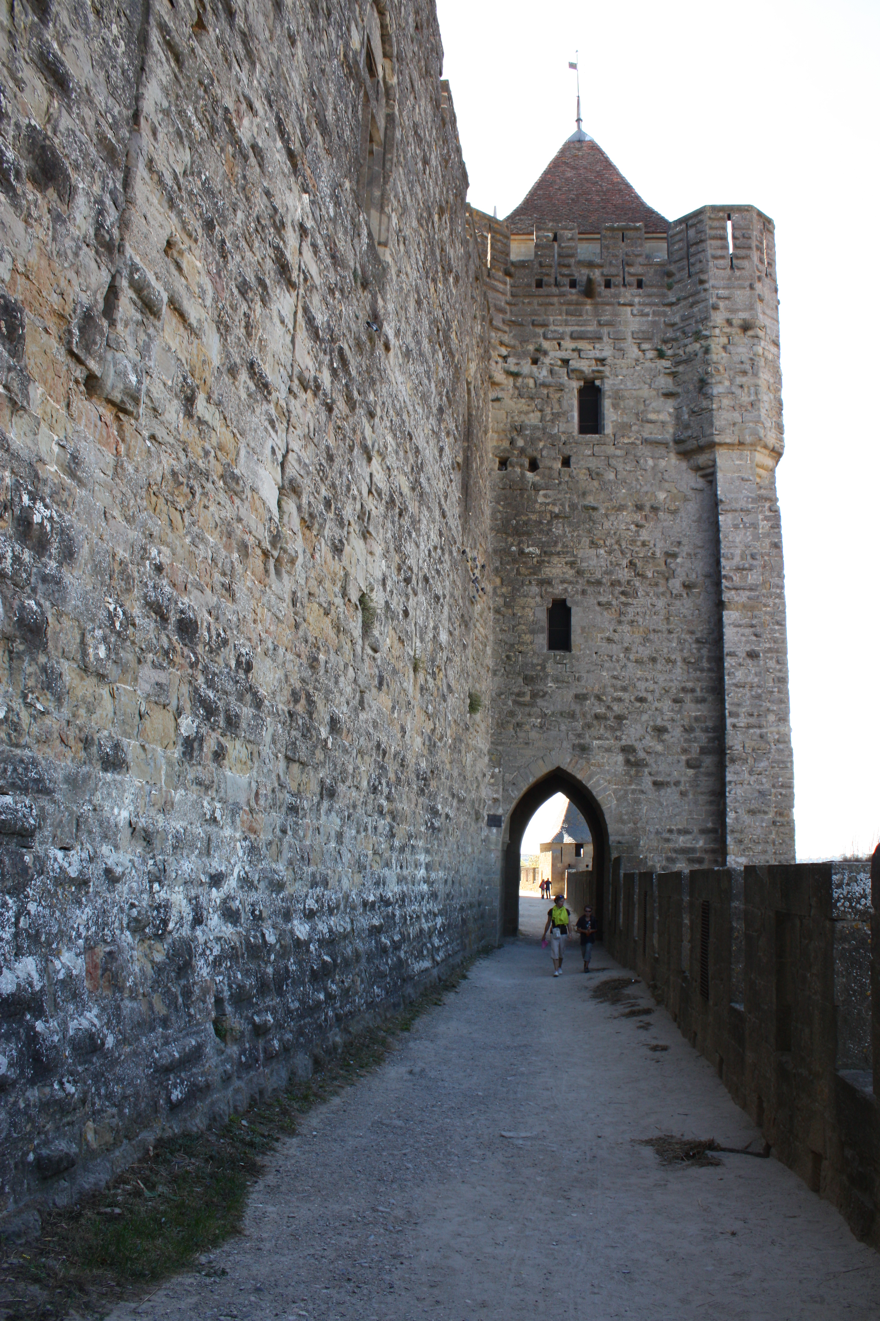 Carcassonne